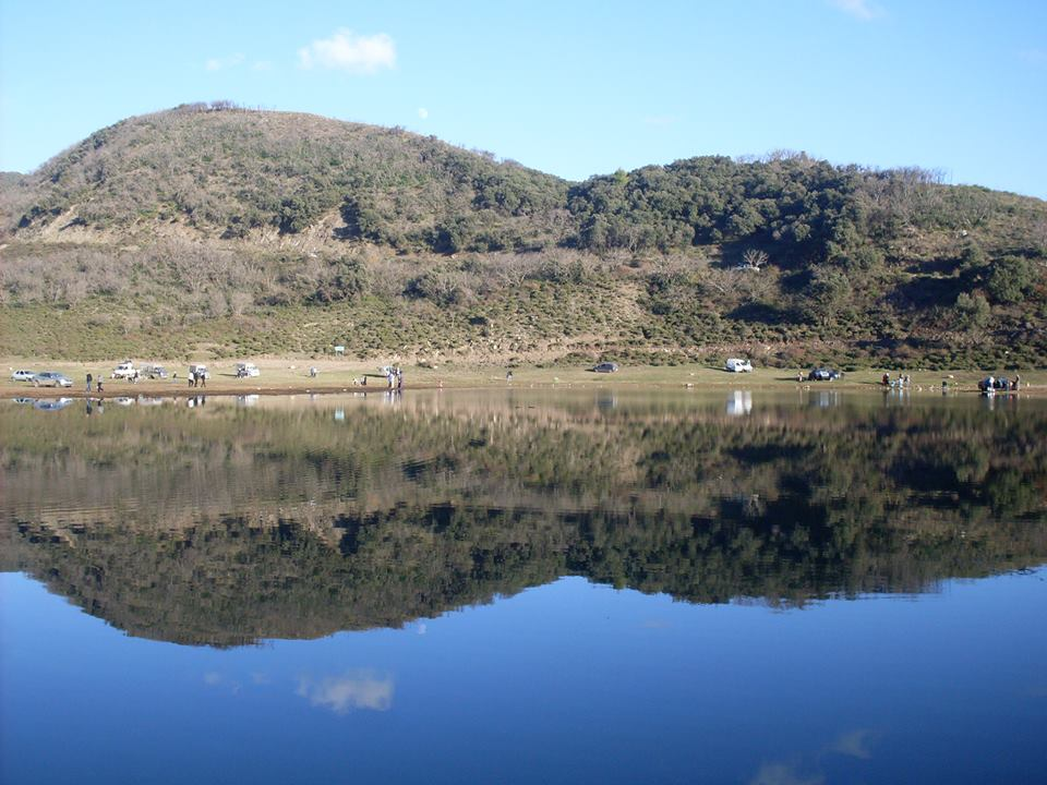 tsouri